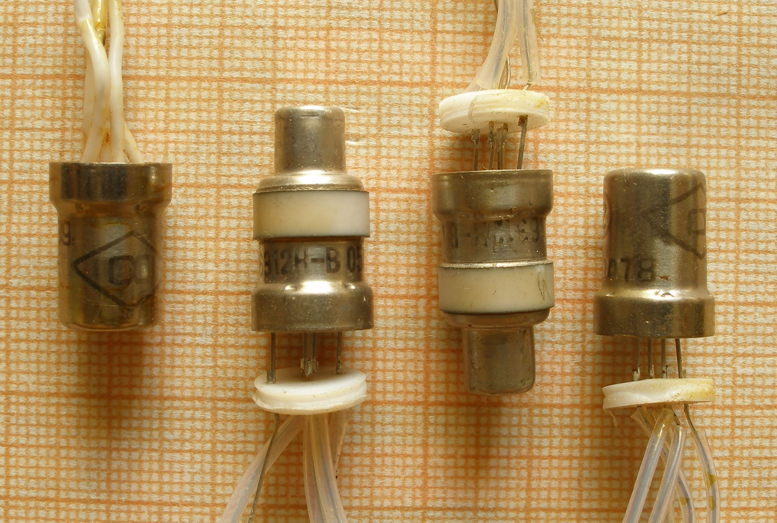 Russian nuvistors